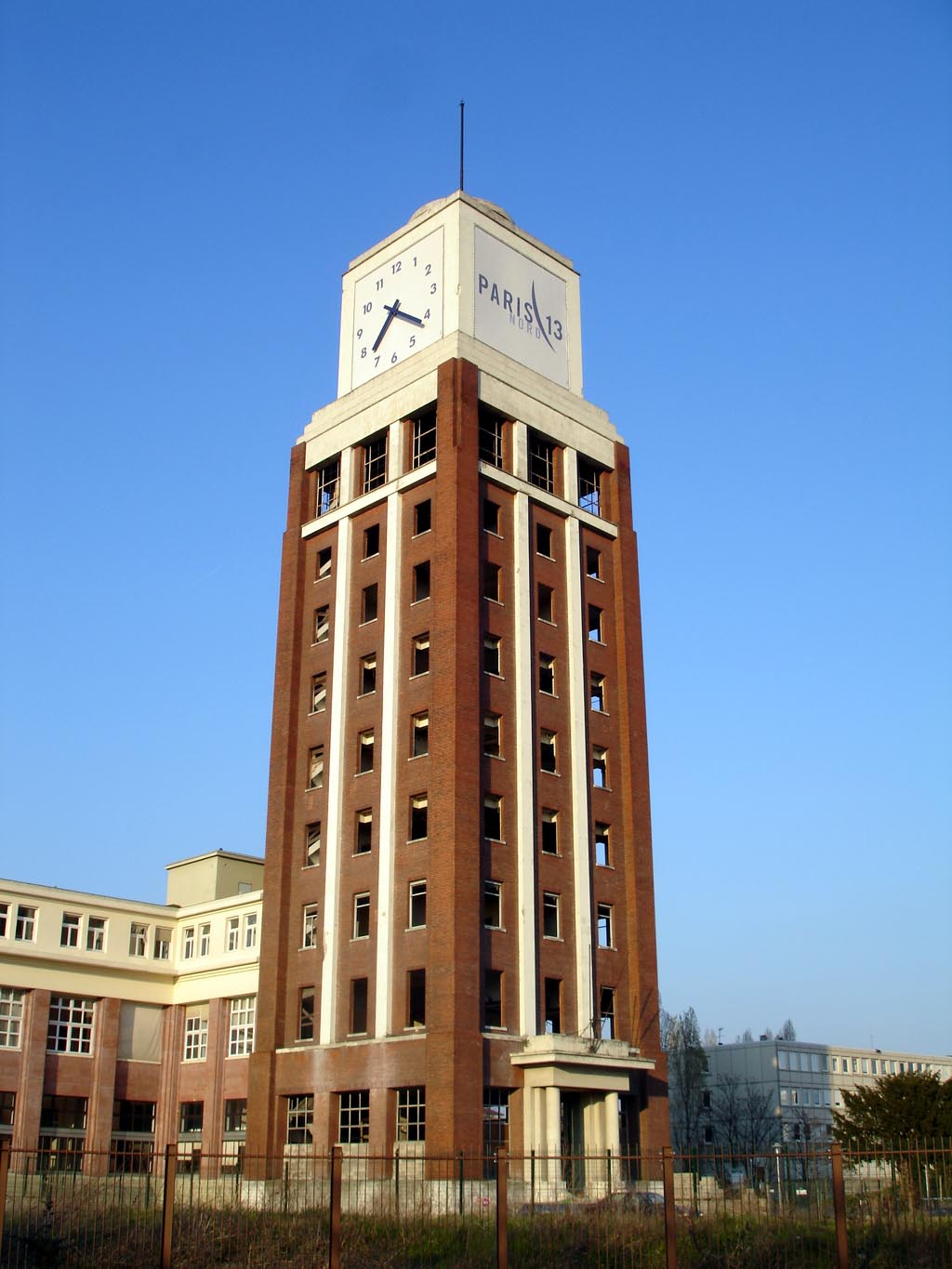 Bobigny (Seine-Saint-Denis), France : La tour de l'ancienne imprimerie de "L'Illustration".